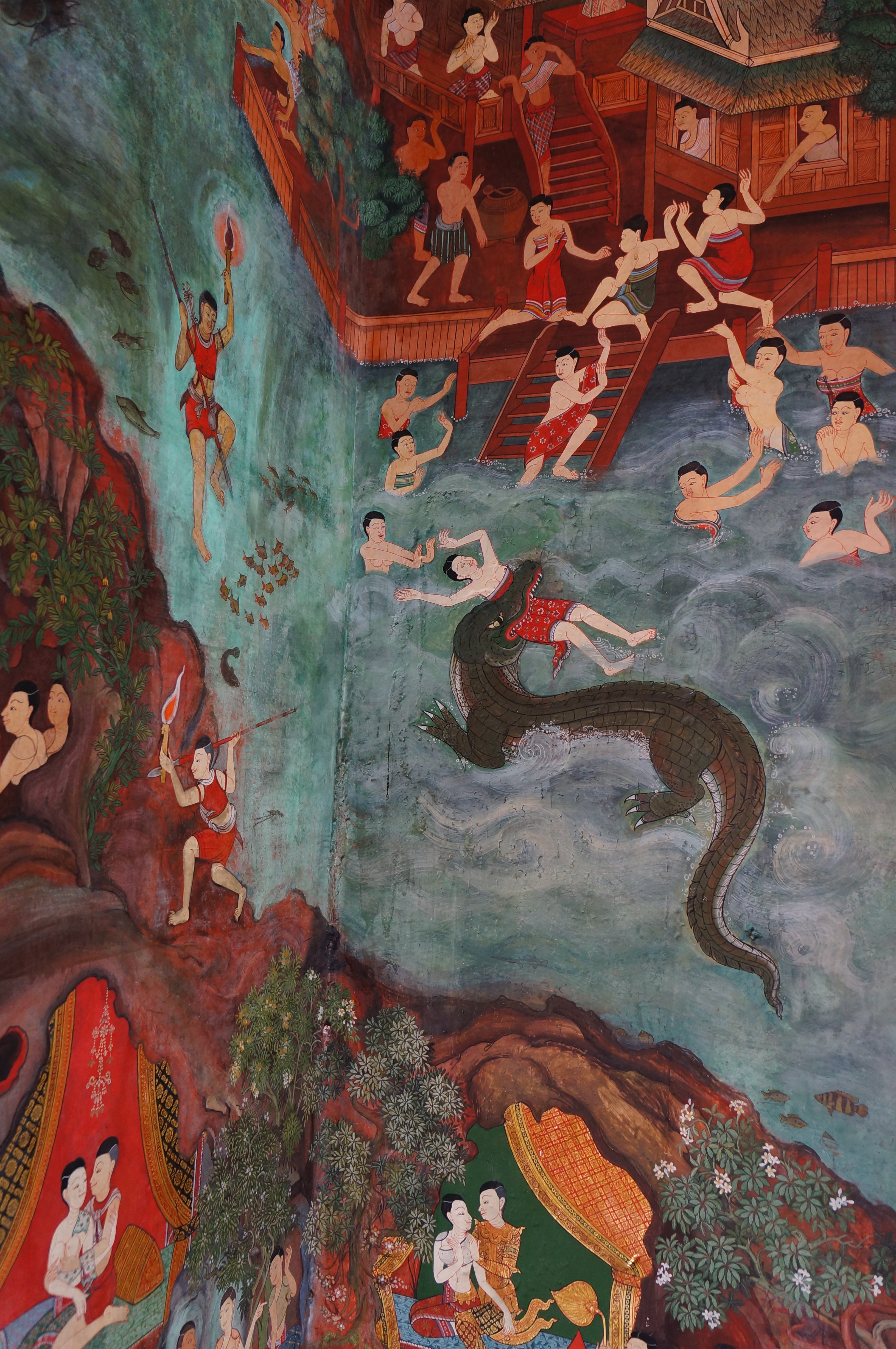 วัดอัมพวันเจติยาราม เป็นพระอารามหลวงชั้นโท ตั้งอยู่ปากคลองอัมพวาด้านเหนือ เดิมเรียกกันว่า "วัดอัมพวา" ต่อมาพระบาทสมเด็จพระนั่งเกล้าเจ้าอยู่หัว ได้พระราชทานนามใหม่ว่า "วัดอัมพวันเจติยาราม" มีความหมายว่า "วัดที่มีเจดีย์และมีสวนมะม่วงเป็นที่รื่นรมย์และเกษมสำราญน่าเคารพบูชา" วัดนี้เป็นวัดต้นวงศ์ราชินิกุล โดยสมเด็จพระรูปศิริโสภาคย์มหานาคนารี (สั้น) พระชนนีในสมเด็จพระอัมรินทรามาตย์ (นาก) ทรงบริจาคที่ดินและสมเด็จพระอัมรินทรามาตย์ได้ทรงรวบรวมพระพี่พระน้องรว่มกันสร้างเป็นวัดขึ้นมา ในรัชสมัยพระบาทสมเด็จพระนั่งเกล้าเจ้าอยู่หัวทรงโปรดเกล้าฯ ให้มีการบูรณะใหญ่และทรงสร้างพระปรางค์ เป็นที่บรรจุพระบรมสรีรังคารและพระบรมอัฐิบางส่วนของพระบาทสมเด็จพระพุทธเลิศหล้านภาลัย พระบรมราชชนก นอกจากนี้ยังทรงสร้างพระวิหารและพระที่นั่งทรงธรรมขึ้นอีกด้วย